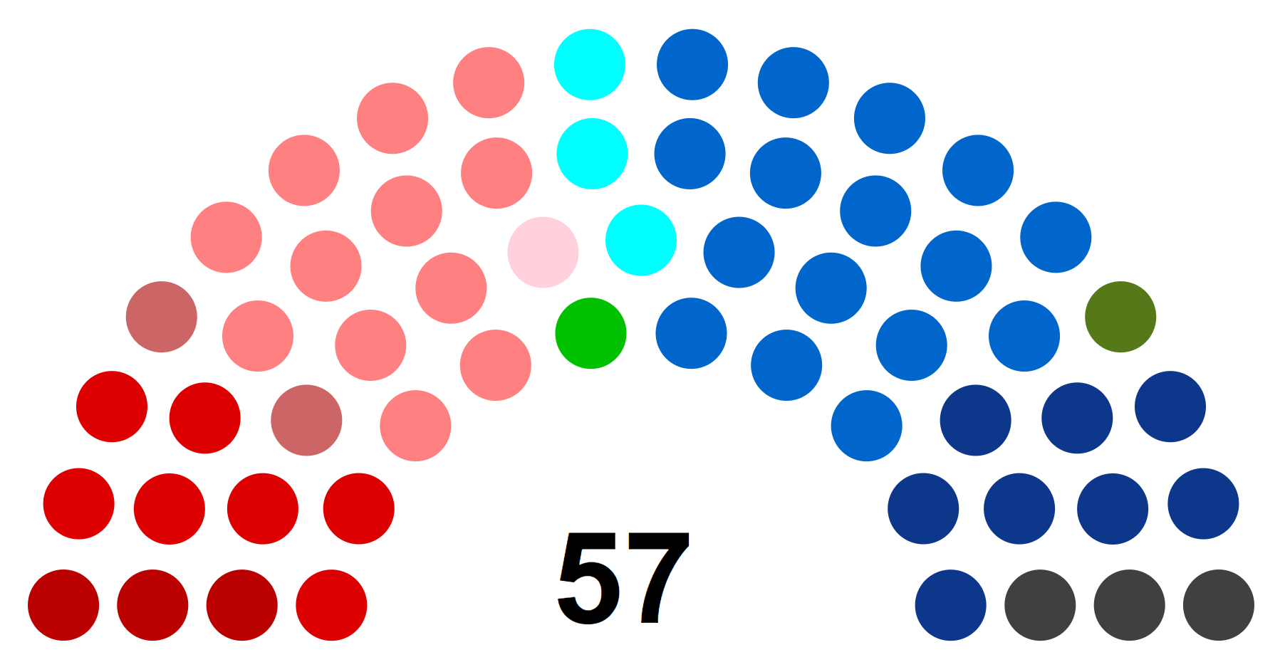 Partis politiques représentés au Conseil régional de Picardie en 2003